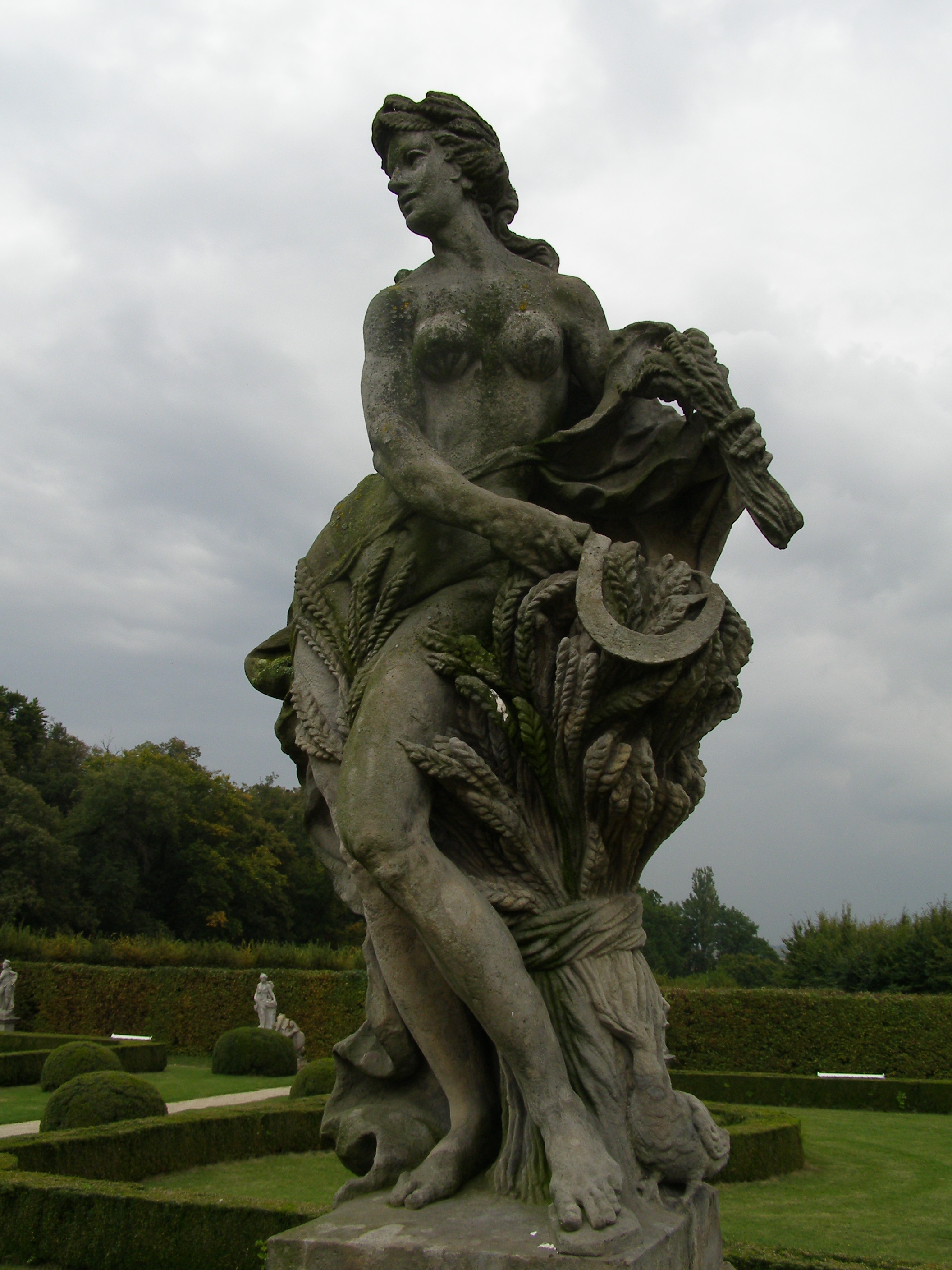 Zámek Lysá nad Labem, Zámecká 1/21, Lysá nad Labem